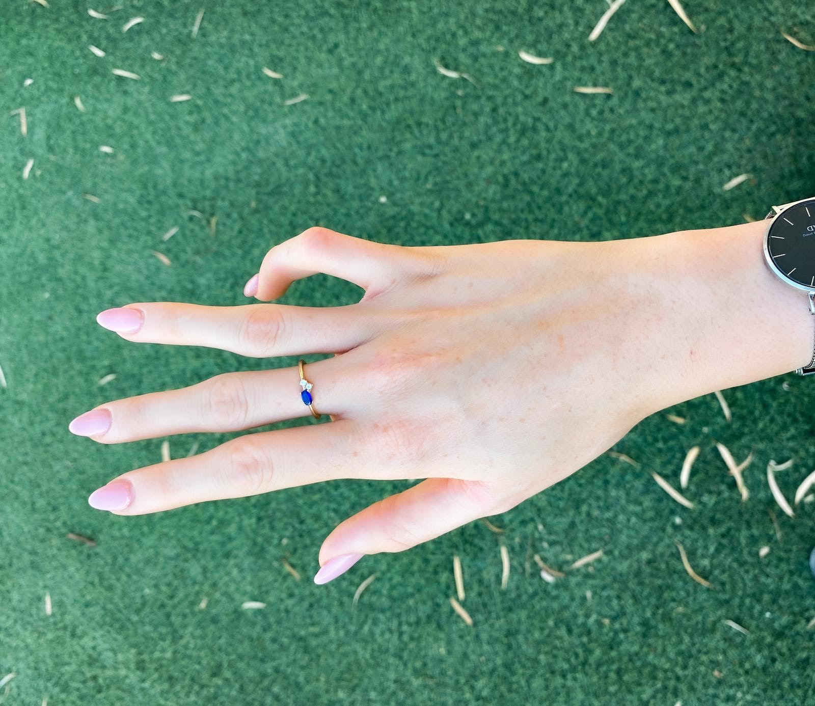 צילום של אישה צעירה בעלת תסמונת בילס